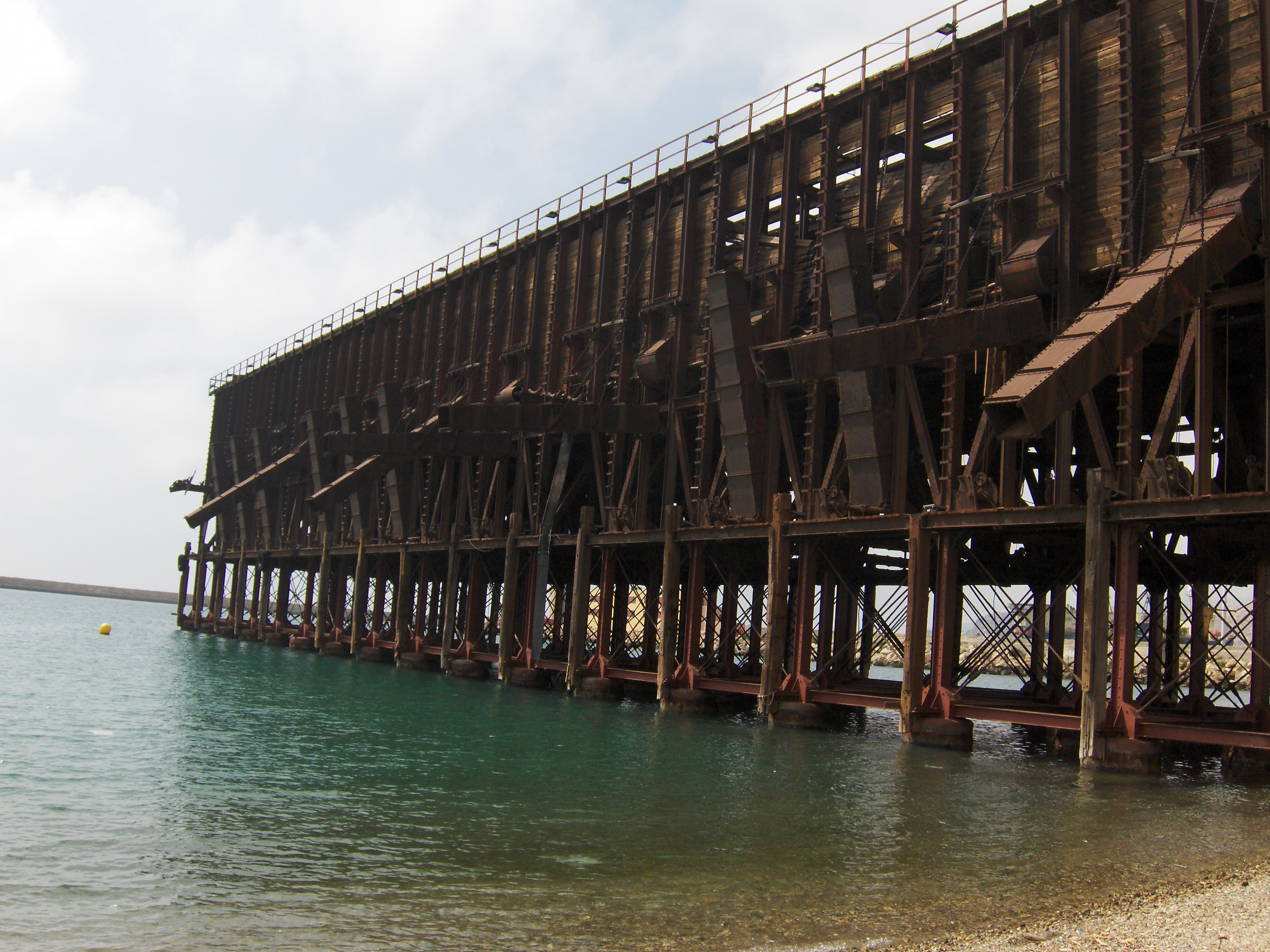 Vista izquierda del cargadero del mineral de Almería